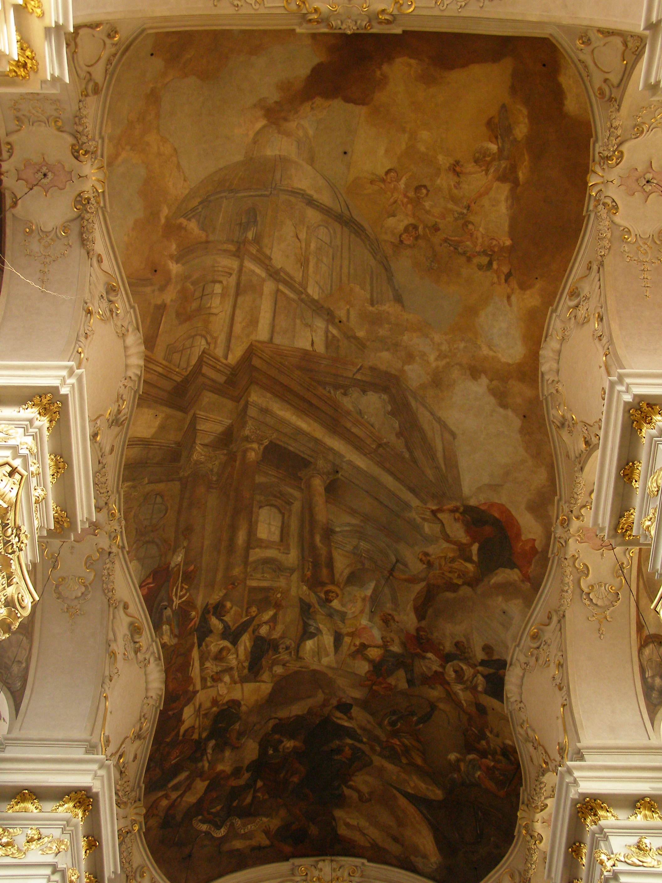 Klášter dominikánský (Staré Město), Praha 1, Husova, Jalovcová, Jilská, Zlatá 234/8, Staré Město